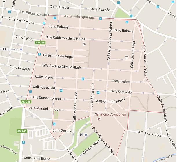 Plano Barrio de El Coto